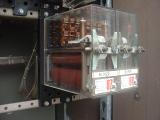 twee B-relais in relaisrek